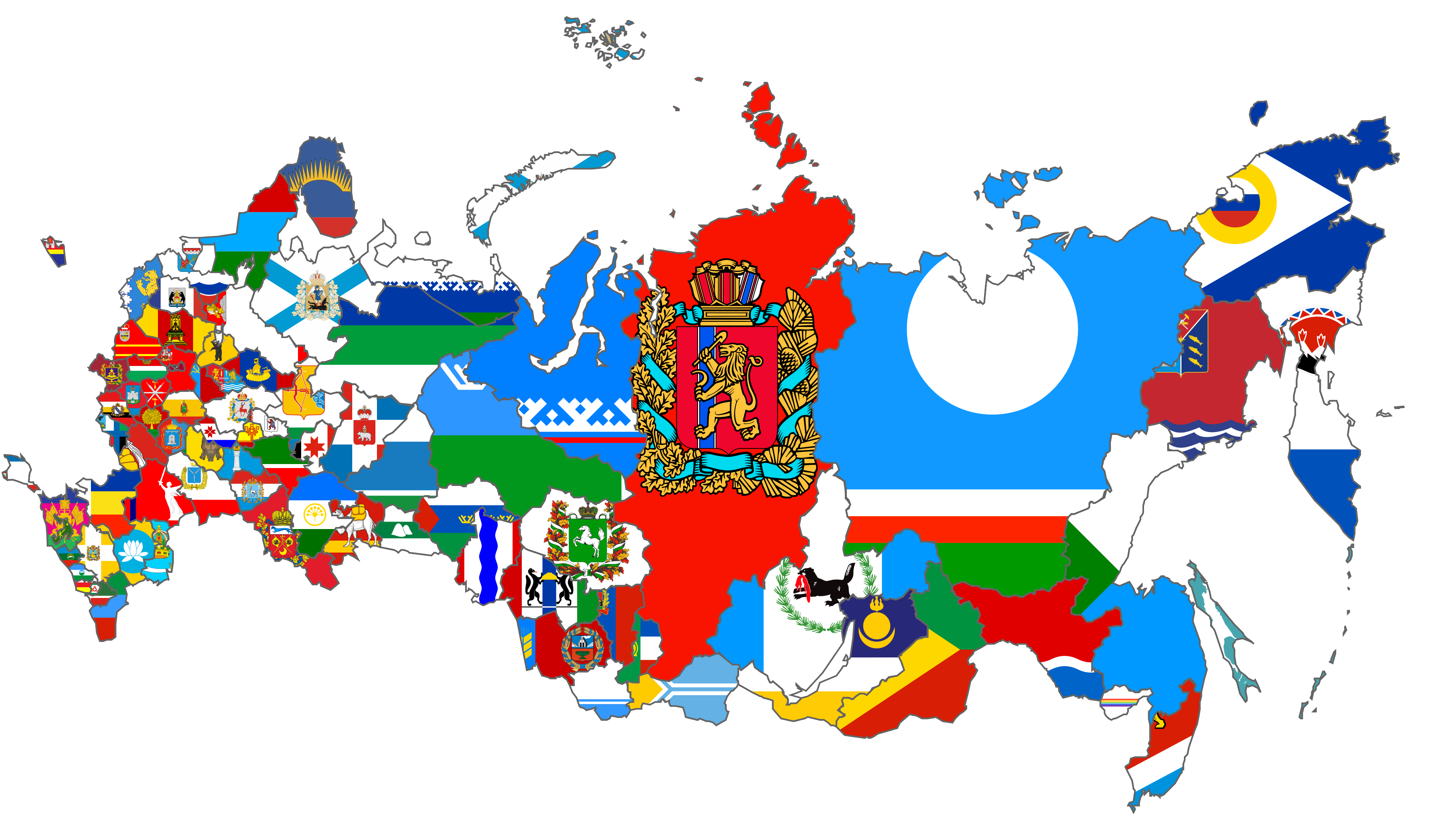 Карта субъектов Российской Федерации с нанесёнными на них флагами.